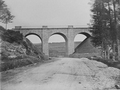 Le viaduc ferroviaire de Beuzit à l'ouest de Landerneau , la route Paris-Brest passe en dessous (photo d'Alfred Bernier prise entre 1862 et 1865)